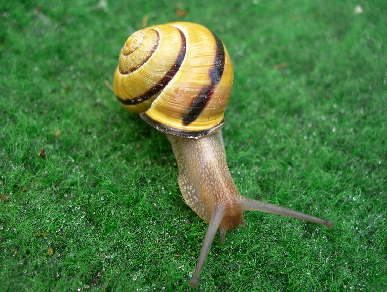 Schnecke; snail (Hainschnirkelschnecke) Cepaea nemoralis